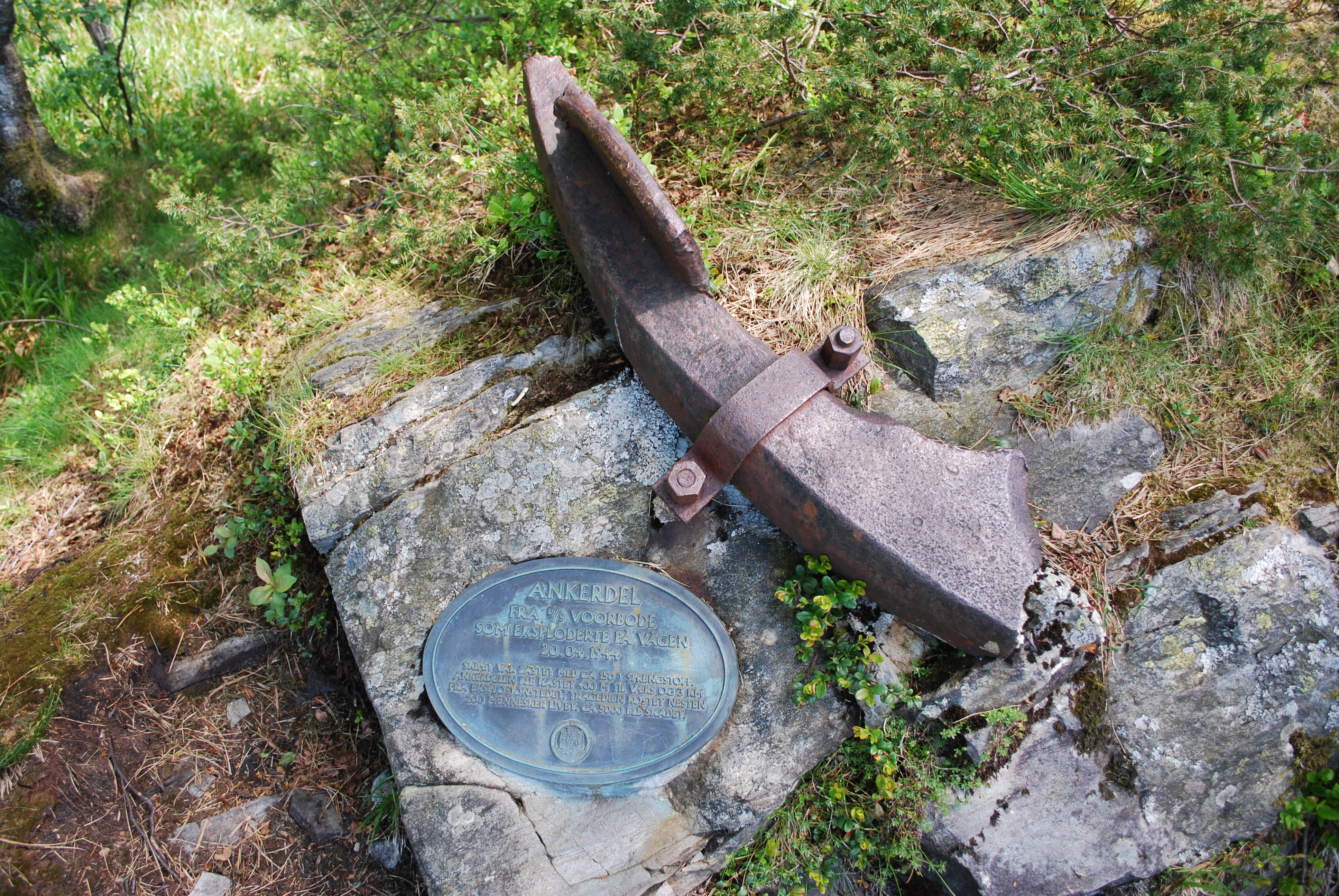 Description= Eksplosjonen på Vågen / Voorbode